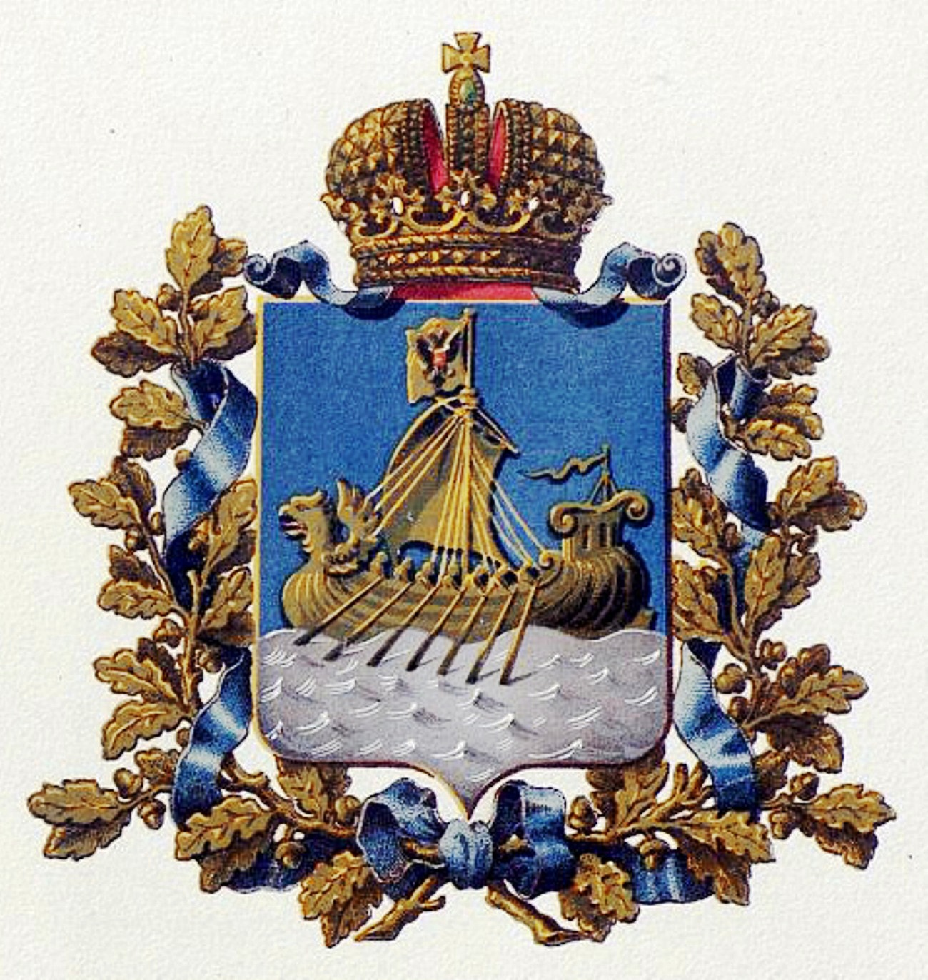 Official Russian Empire coat of arms Kostroma Governorate. Герб Российской Империи Костромской губернии в Гербовнике МВД. Утверждён Императором Всероссийским Александром Вторым.